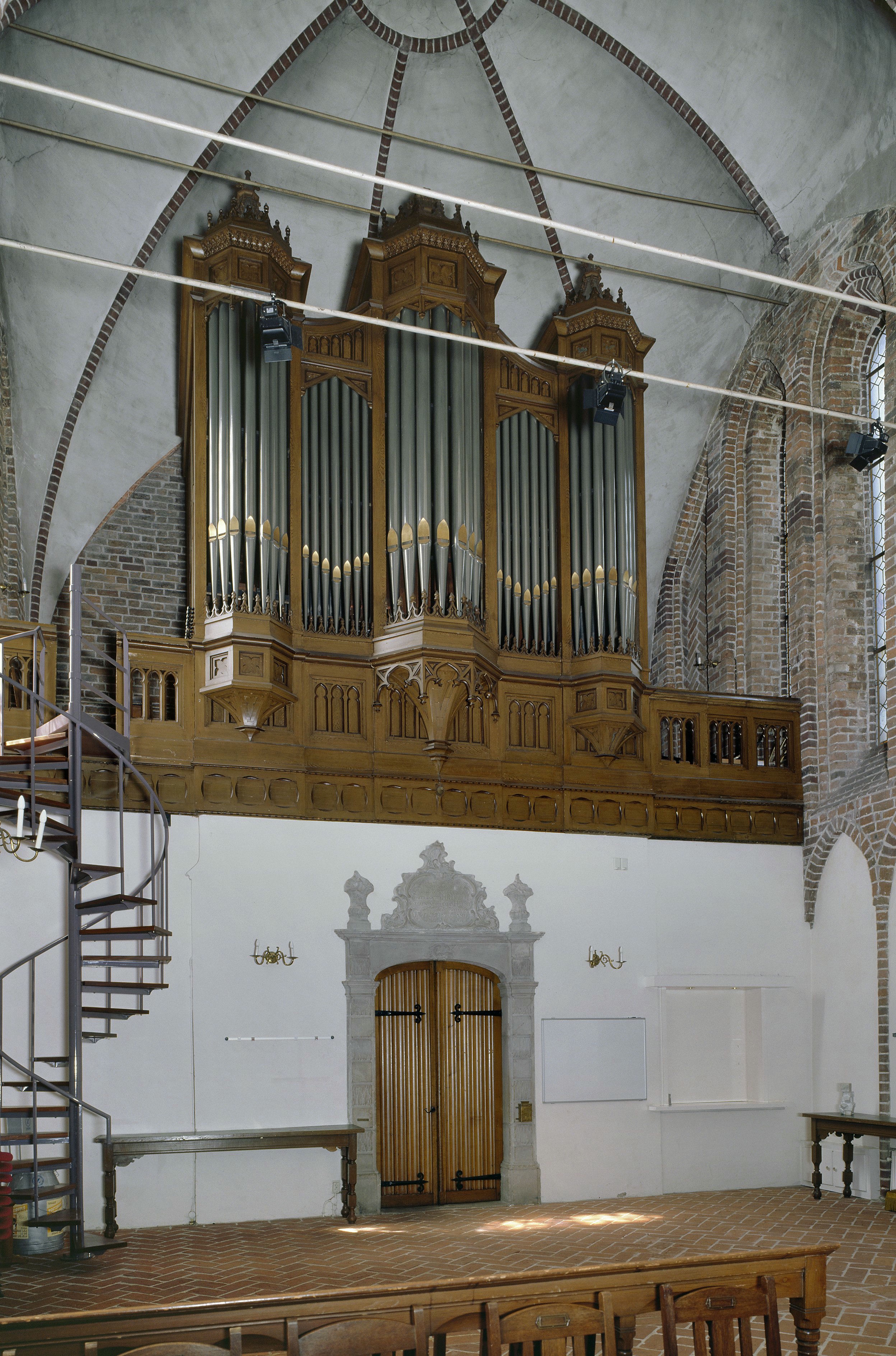 Nederlands Hervormde Kerk: Interieur, aanzicht orgel, orgelnummer 1680 (opmerking: Gefotografeerd voor Het Historische Orgel in Nederland 1865-1872)